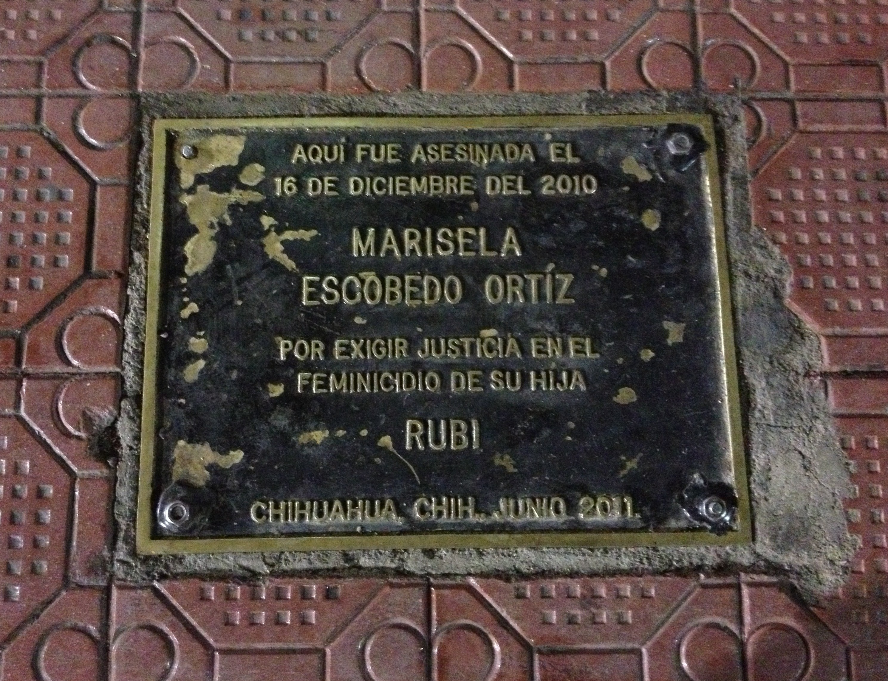 Placa conmerativa del lugar del asesinato de la activista mexicana Marisela Escobedo Ortiz en la banqueta del Palacio de Gobierno de Chihuahua